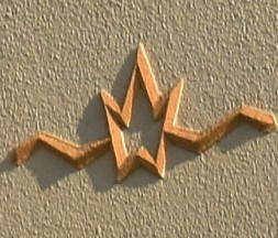 detail na fasádě Villy Ehmig, T. G. Masaryka čp. 883, Kadaň.